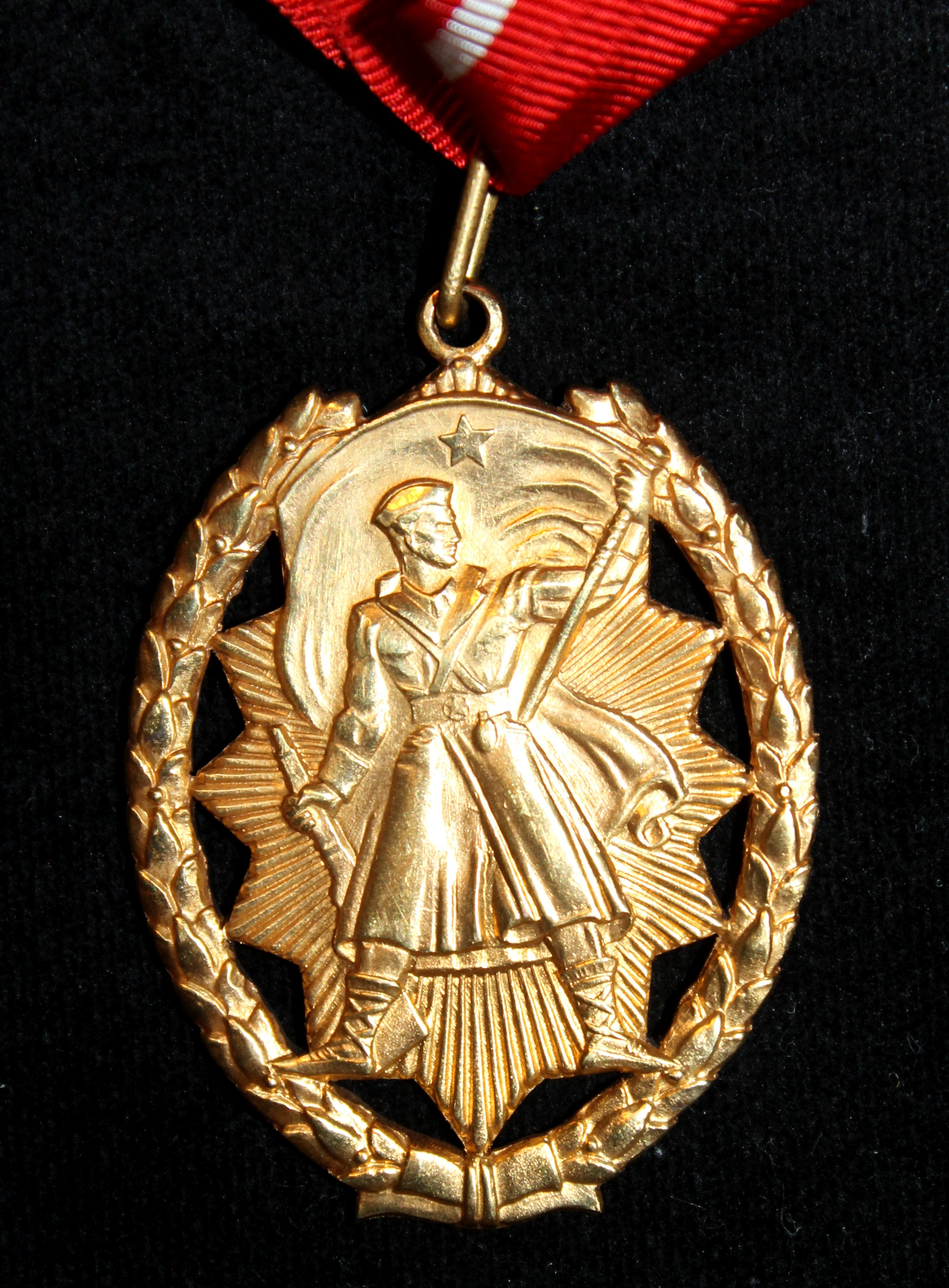 Орден народног хероја